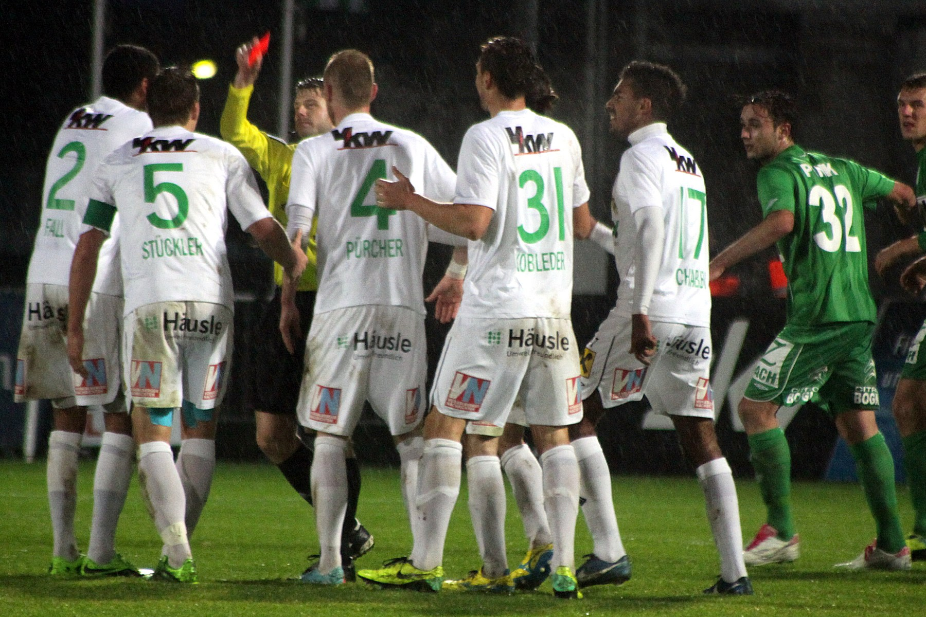 Meisterschaftsspiel der Ersten Liga: SV Mattersburg gegen SC Austria Lustenau (2:2) am 22. November 2013 im Mattersburger Pappelstadion. – Das Foto zeigt Schiedsrichter Andreas Heiß beim Zeigen der gelb-roten Karte für Christoph Stückler (SC Austria Lustenau).